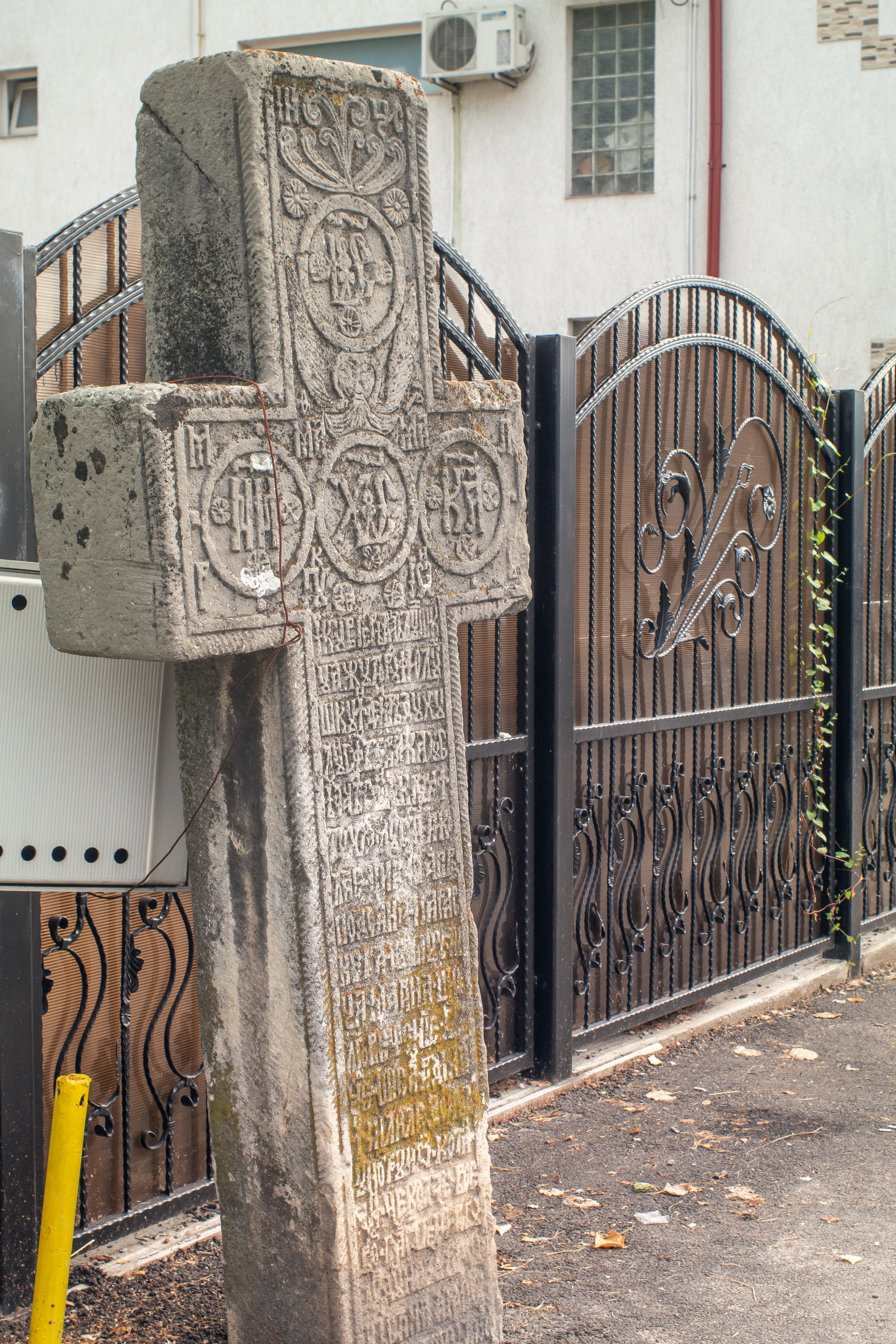 Câmpulung, Cruce de piatră lângă Liceul Teoretic "Dan Barbilian", peste Podul Băilor.